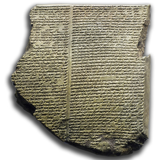 Diese Keilschrifttafel (Tafel XI des Gilgamesch-Epos) enthält die Sintflutgeschichte. Sie ist im Britischen Museum ausgestellt.